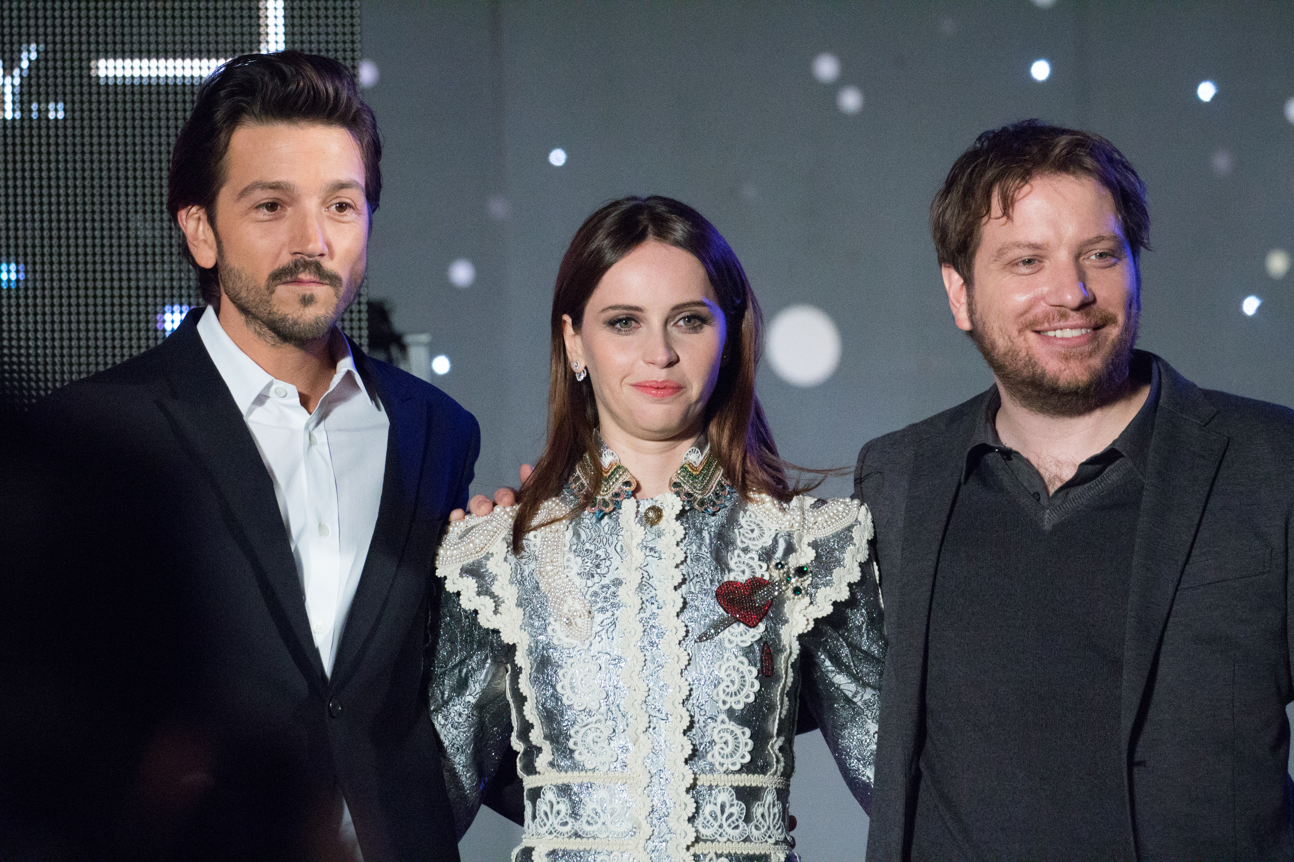 ローグ・ワン/スター・ウォーズ・ストーリー ジャパン・プレミア レッドカーペット ディエゴ・ルナ フェリシティ・ジョーンズ ギャレス・エドワーズ